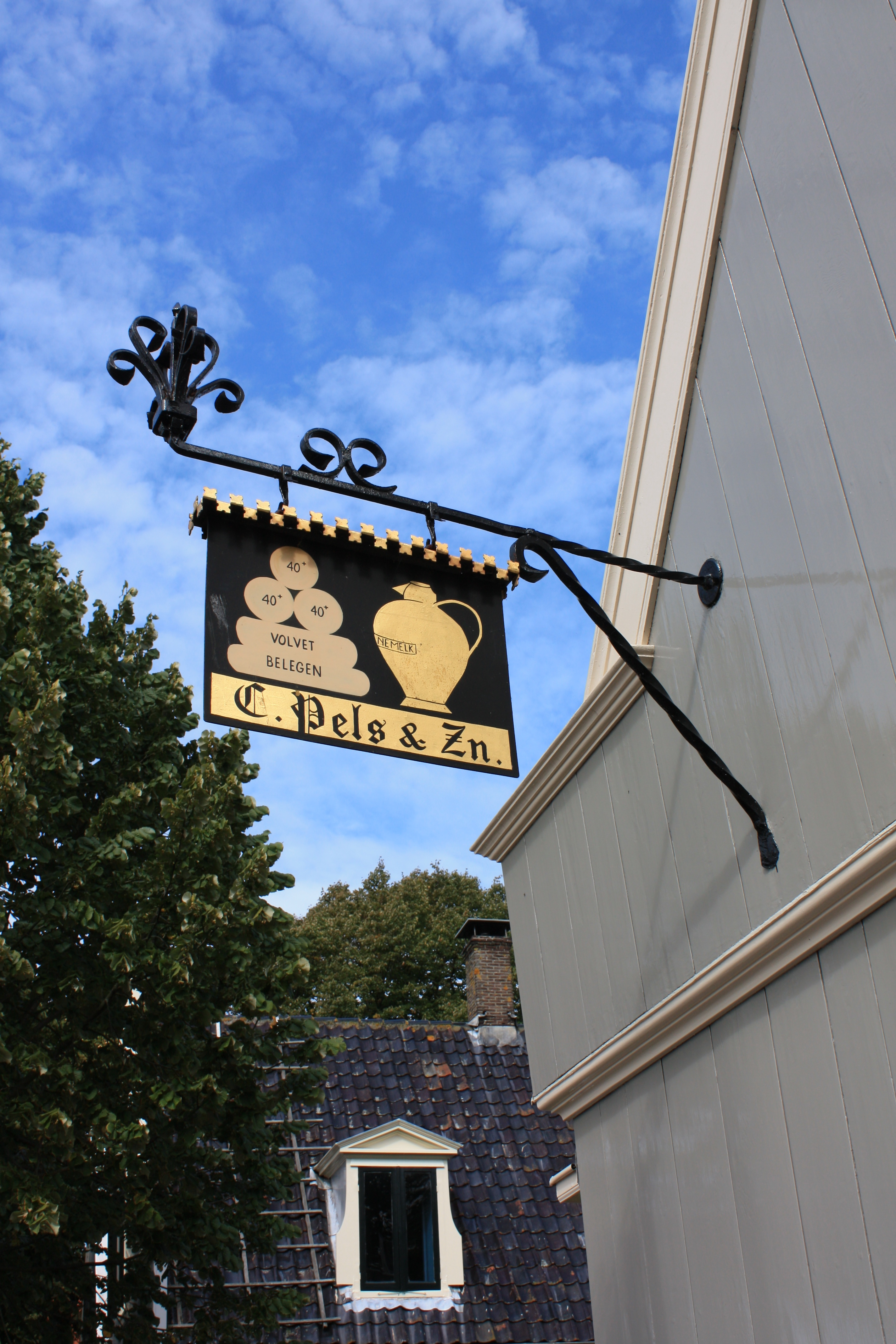 sign on Havenrak, Broek in Waterland, Netherlands